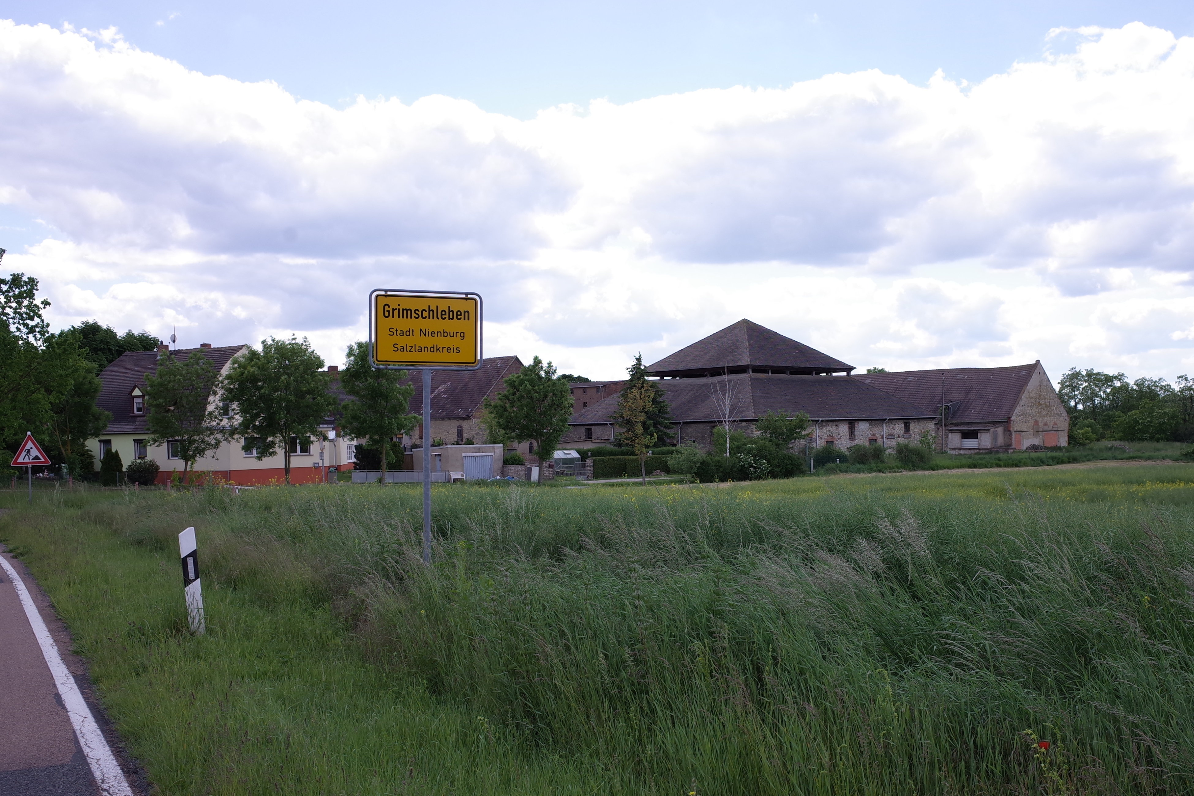 Nienburg (Saale), Ortsteil Grimschleben. Rechts im Bild der 1827 von Christian Gottfried Heinrich Bandhauer erbaute Schafstall. Die Nummern können vertauscht sein.)